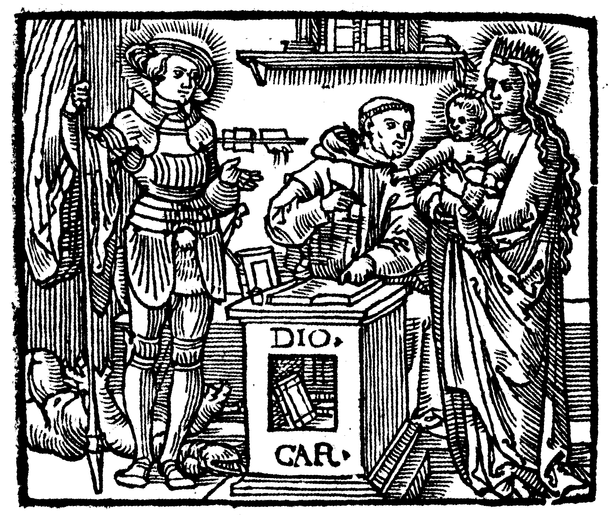 Anton Woensam, Dionysius (der Kartäuser) mit der Madonna und dem hl. Georg (Holzschnitt)